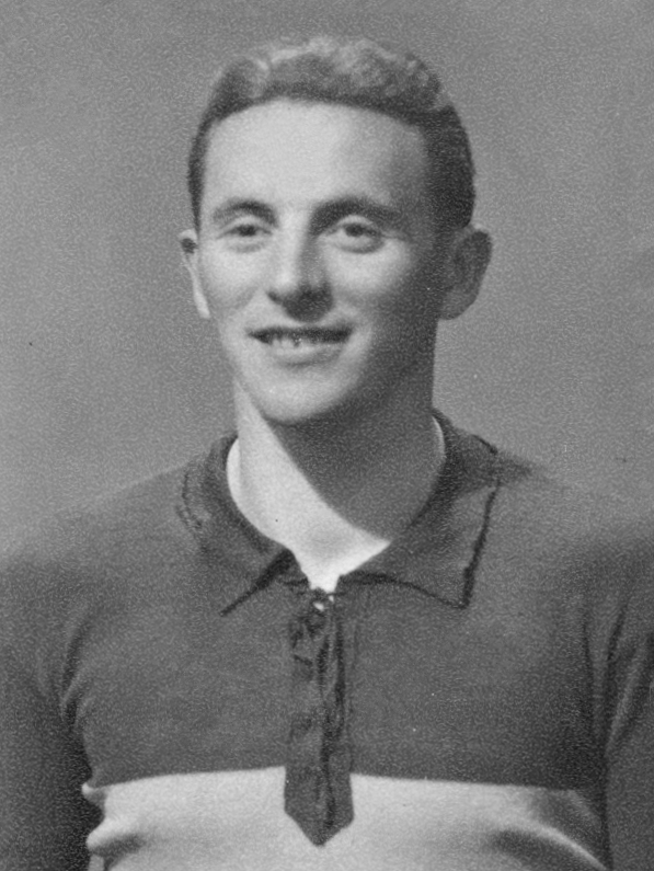 Zoltan Farmati